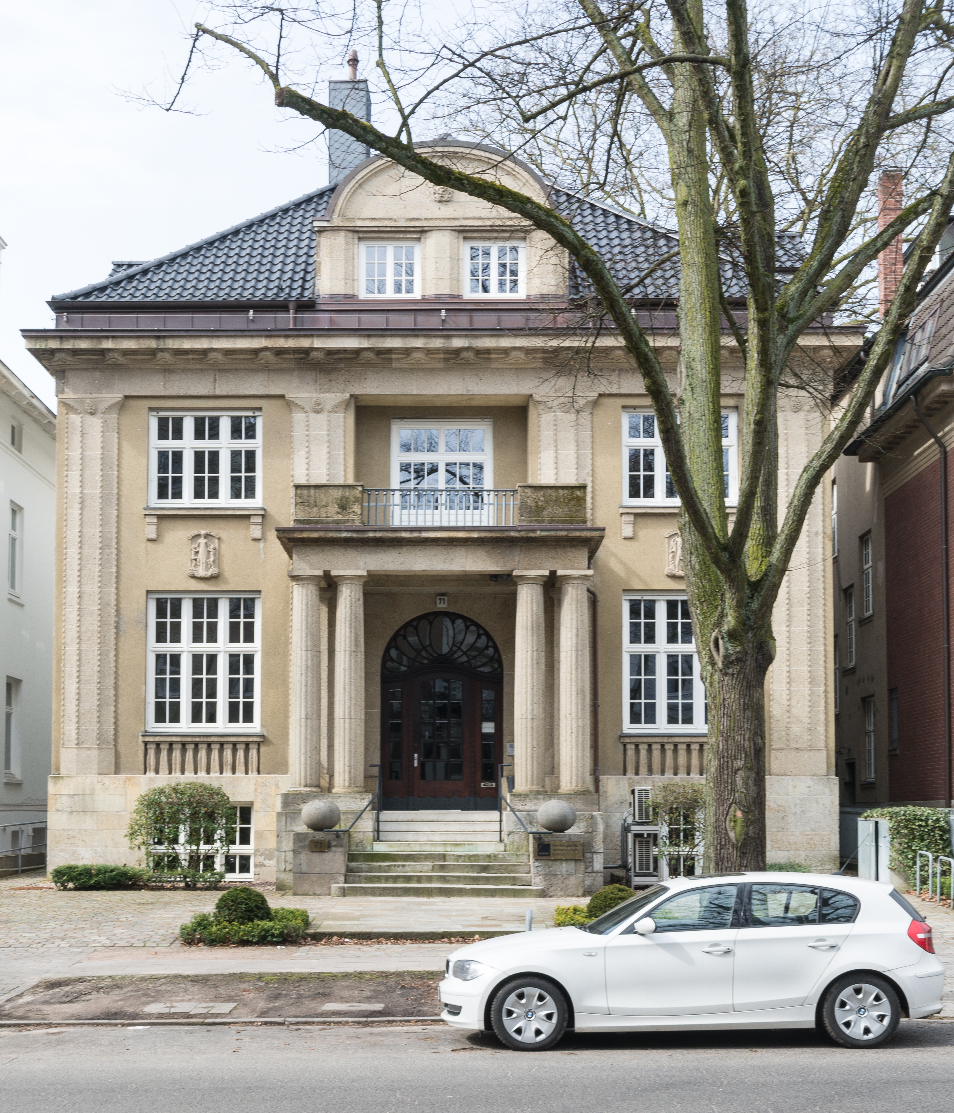 Villa Heimhuder Straße 71 in Hamburg-Rotherbaum. This is a photograph of an architectural monument.